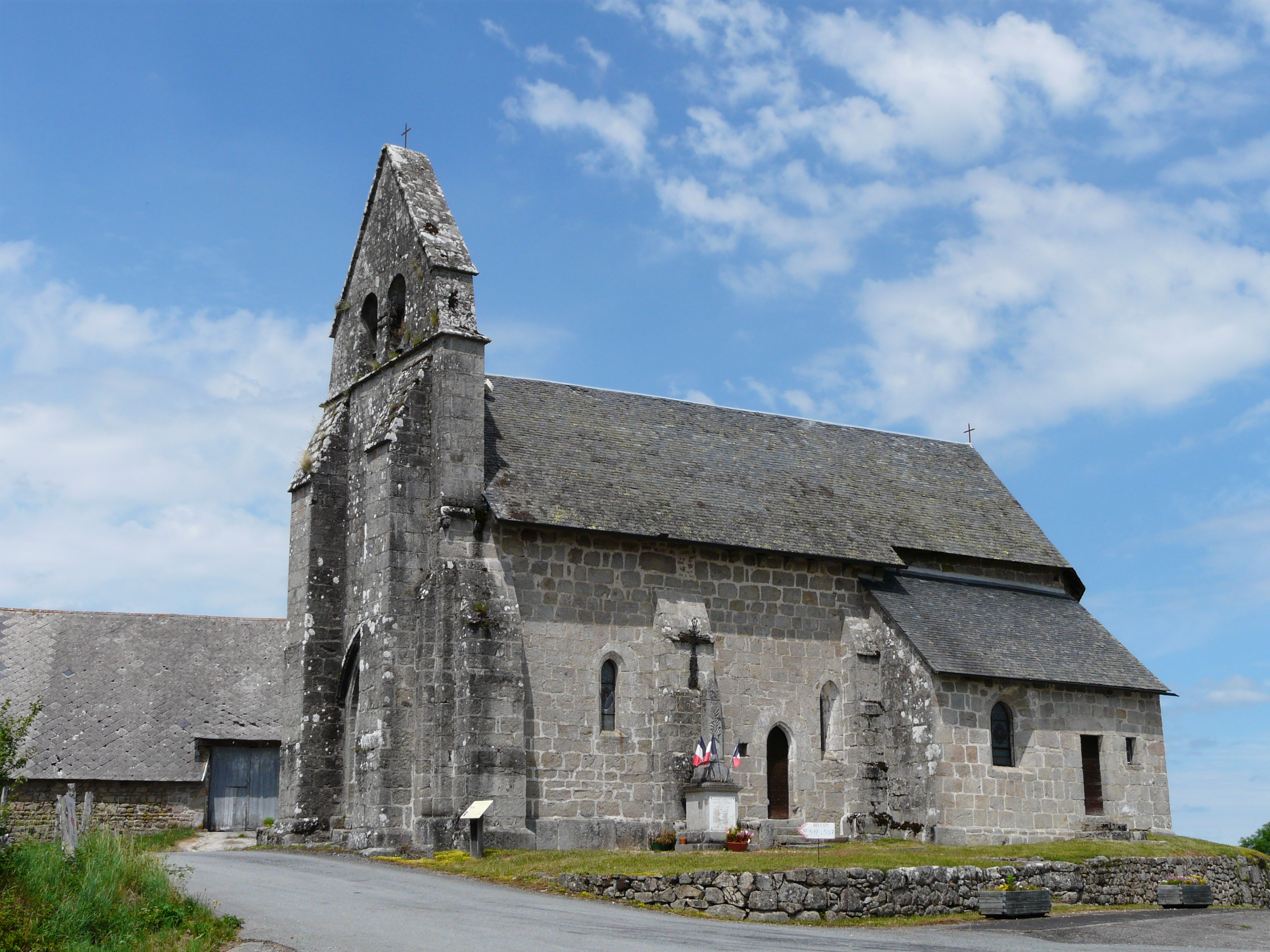 L'église Notre-Dame-de-l'Assomption, Sainte-Marie-Lapanouze, Corrèze, france.